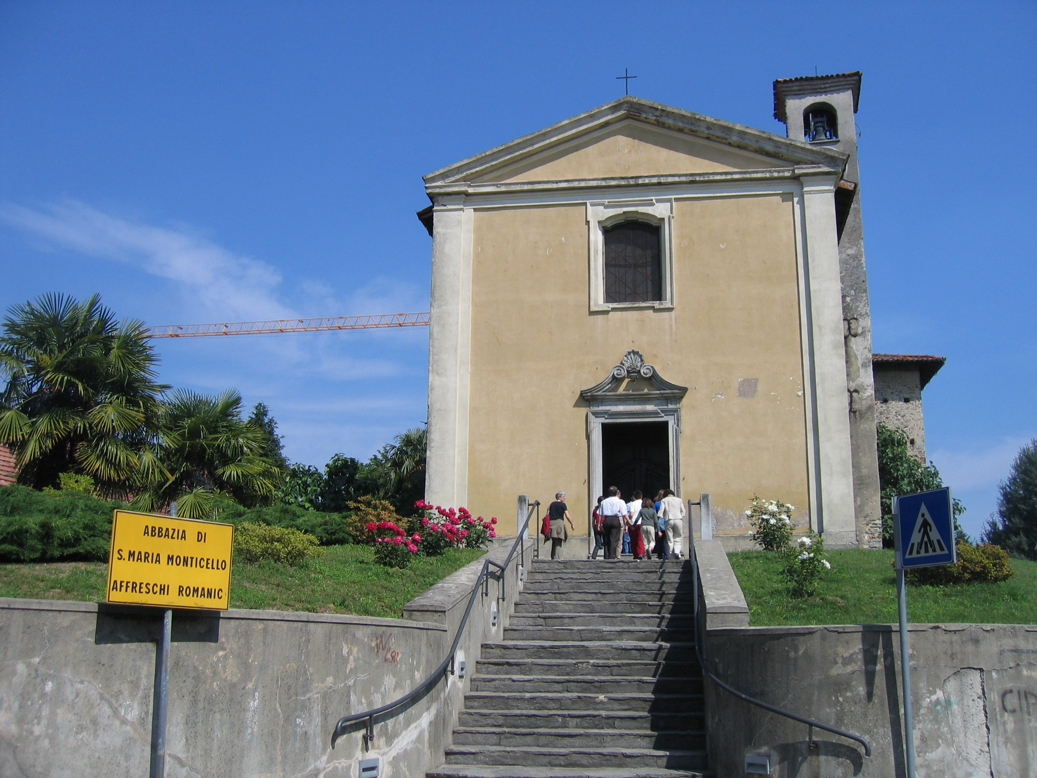 Chiesa di Santa Maria in Monticello This is a photo of a monument which is part of cultural heritage of Italy.